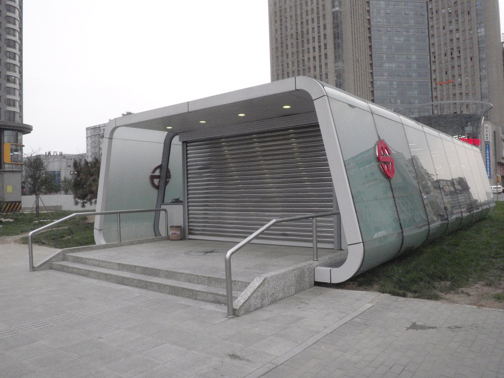 中国、瀋陽地下鉄1号線、鉄西広場駅の入口。